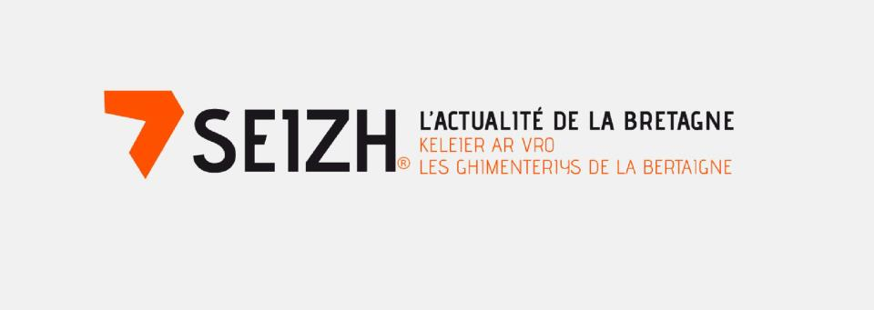 Logo